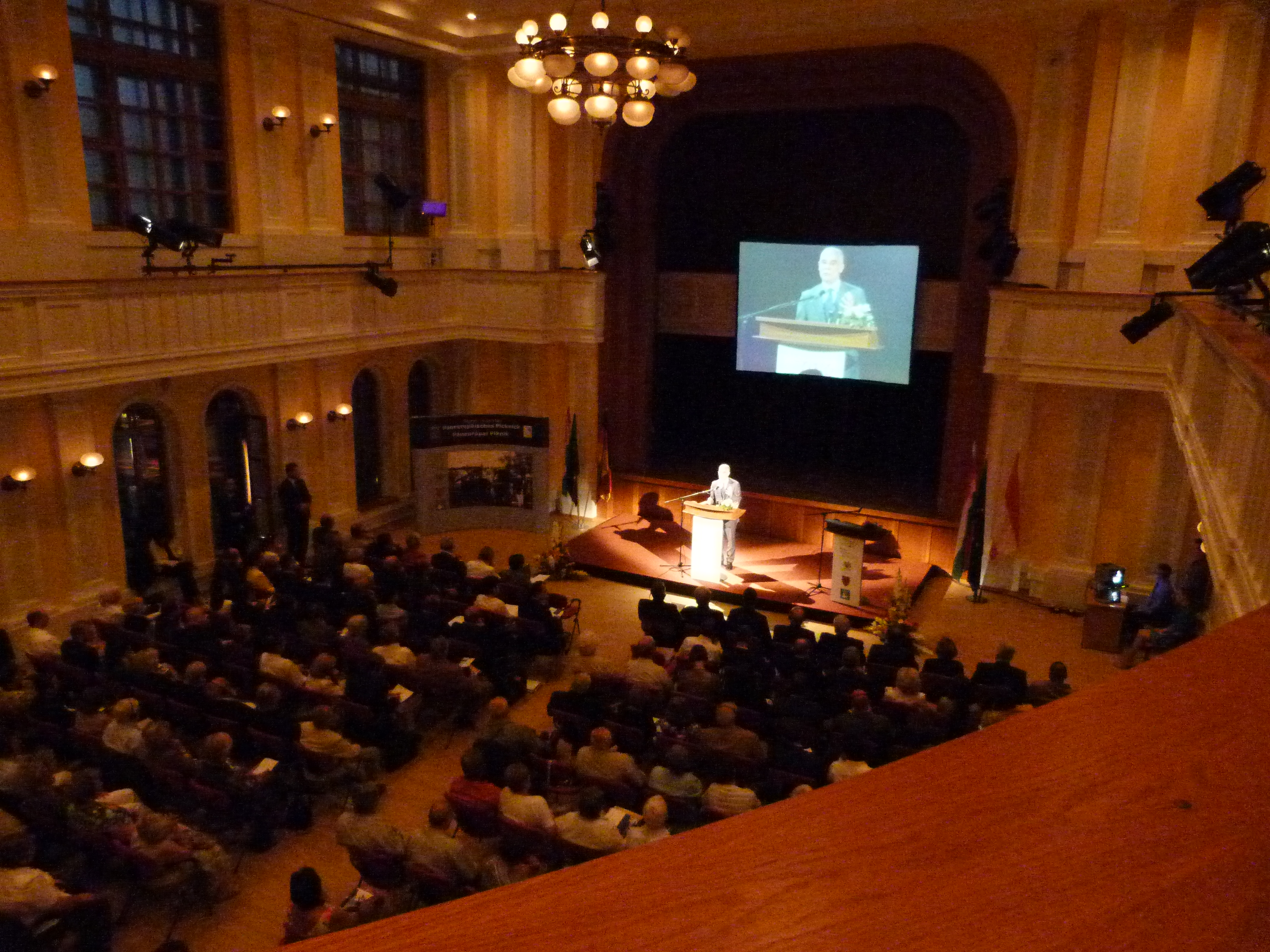 A felvétel 2014. augusztus 19-én készült Sopronpusztán. A Páneurópai Piknik 25. évfordulója. ©© Derzsi Elekes Andor, Budapest 2014, You are authorised to use these photos and vids under Creative Commons – even for commercial, for profit purposes. Photos must be attributed to Derzsi Elekes Andor. All of the photos and vids in the Metapolisz DVD line are under Creative Commons and can be used even for commercial – for profit – purposes. Recommended Citation Derzsi Elekes Andor: Metapolisz DVD line